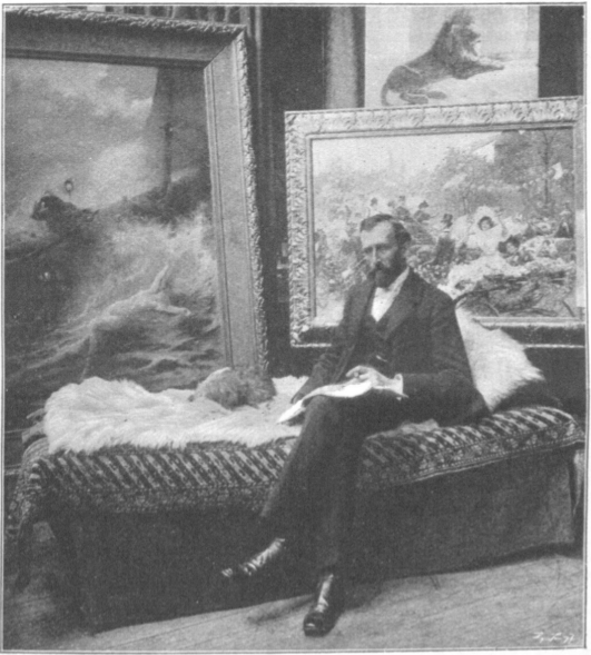 Gustav Wertheimer (1847-1902) in seinem Atelier